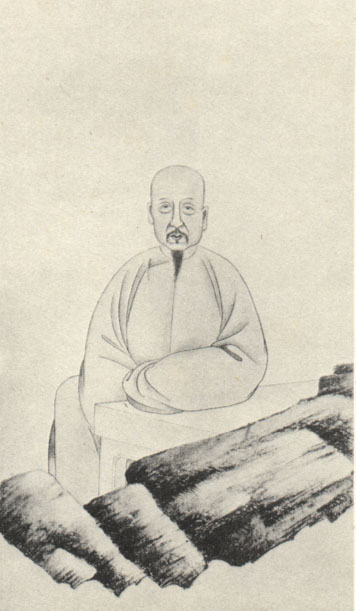 曹贞吉，清代学者。Cao Zhenji